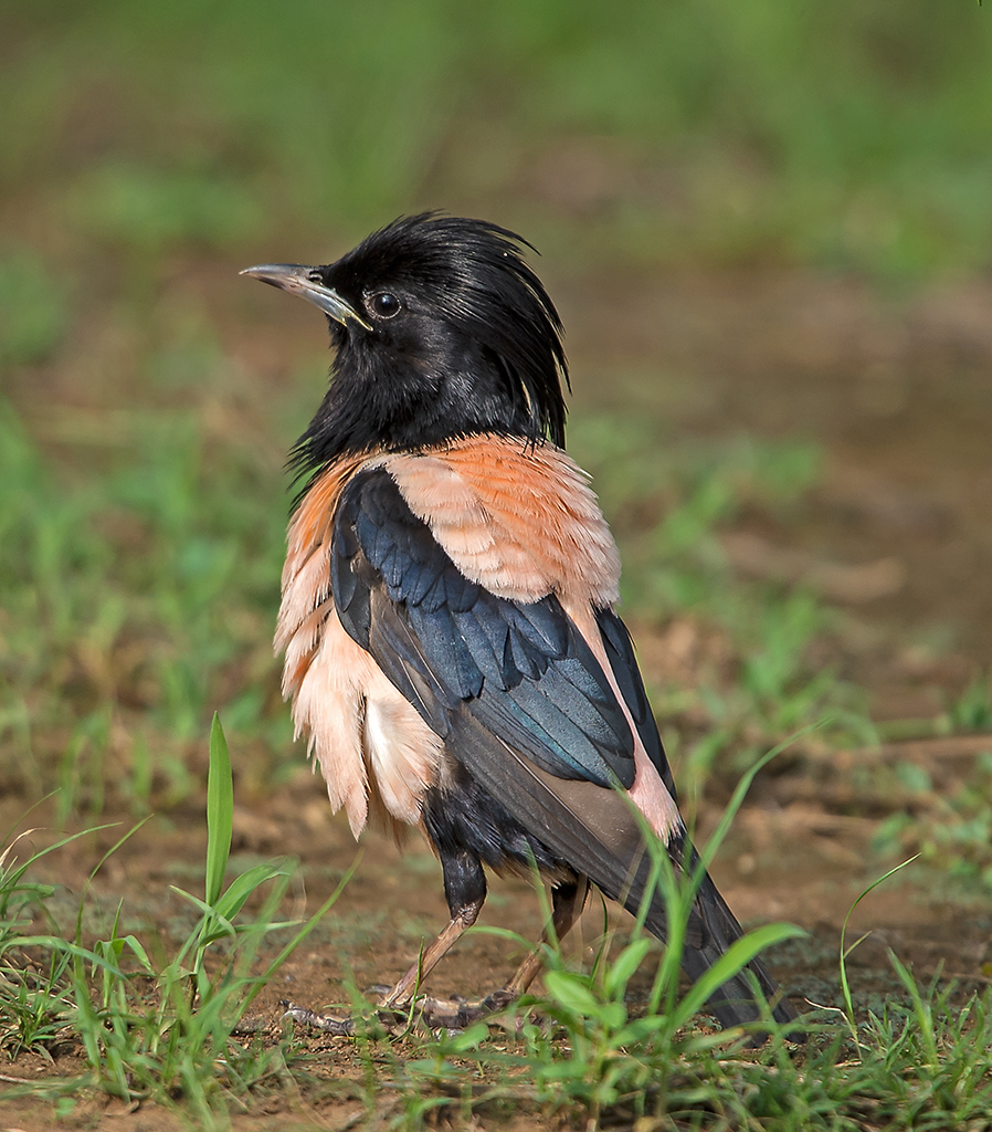 Étourneau roselin (Pastor roseus) - Photo prise à Sonkhaliya, Rajasthan en début d'août 2014